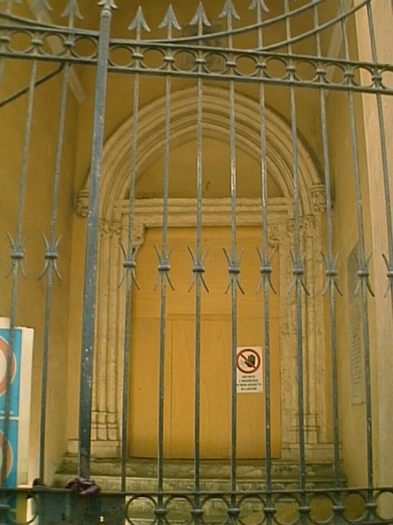 Chiesa della Purissima, XVI secolo, Cagliari